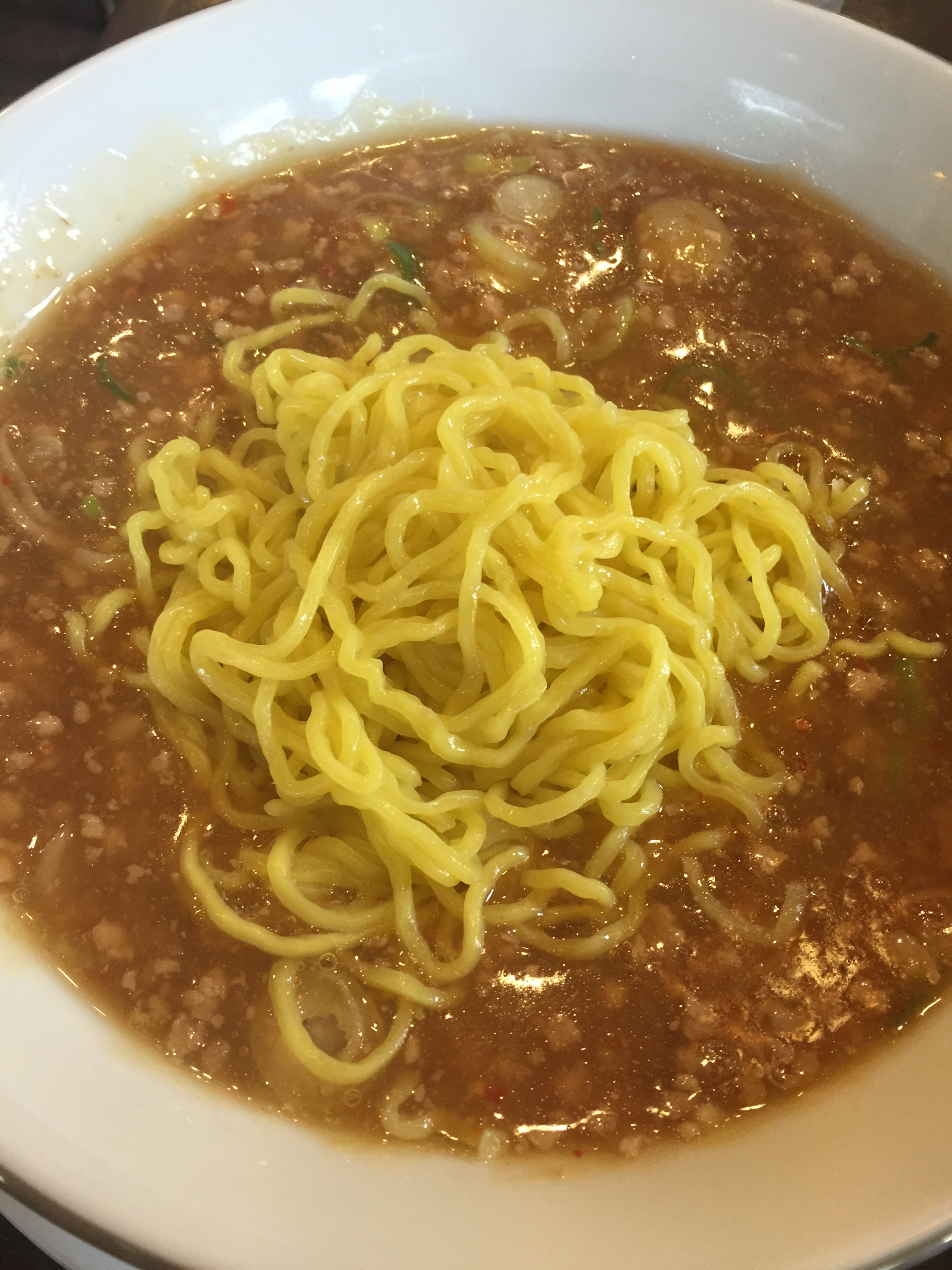 神奈川県小田原市上曽我四川 小田原系担々麺